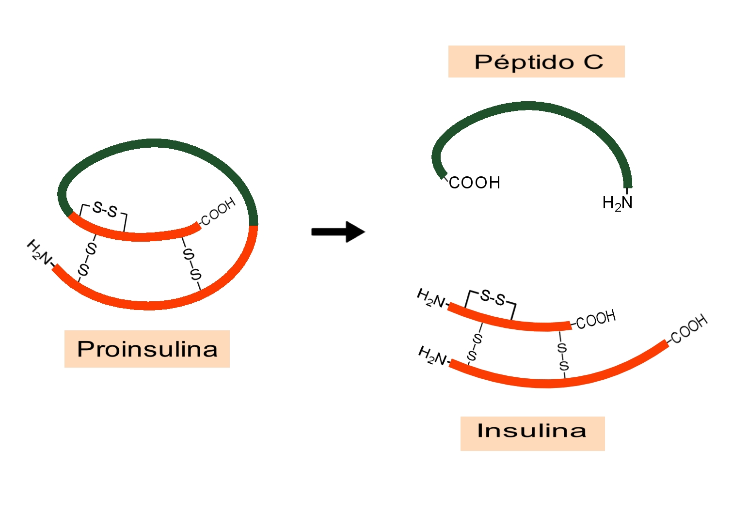 Esquema en el que se muestra como la proinsulina da lugar a insulina y péptido C